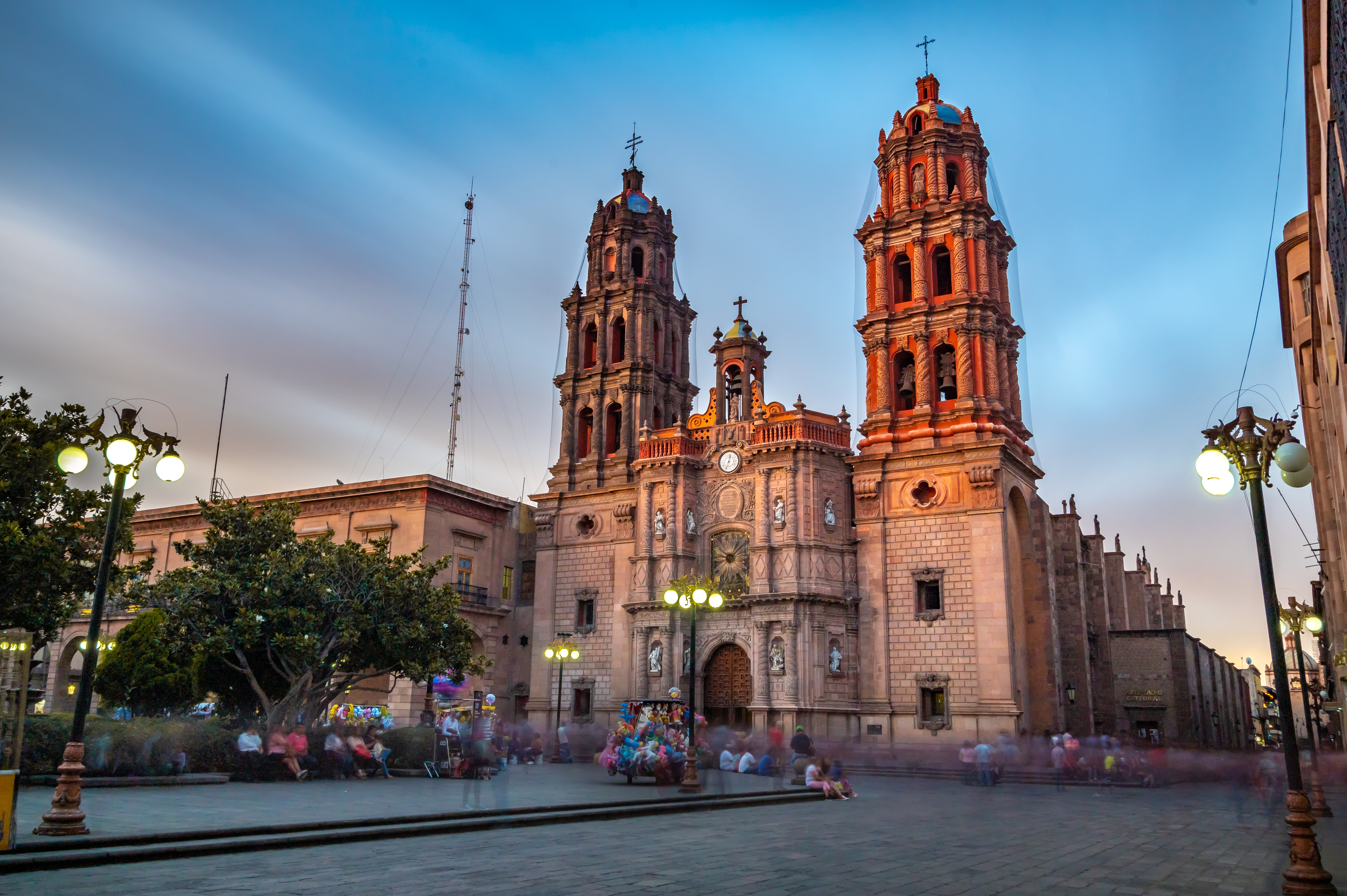 Catedral de San Luis Potosí al atardecer con un cielo con nubes.